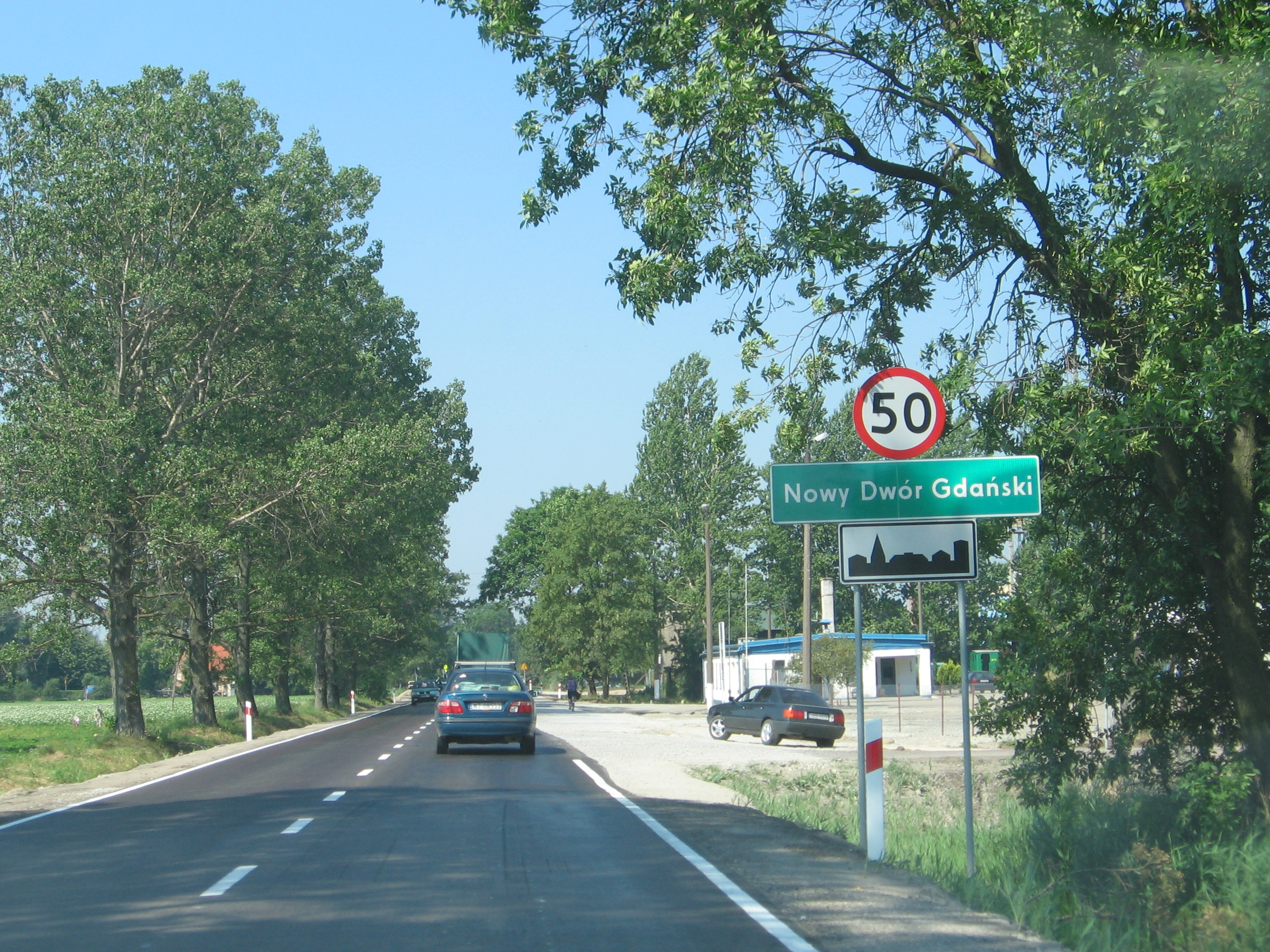 Nowy_Dwor_Gdanski, (Nowy Dwór Gdański), Poland